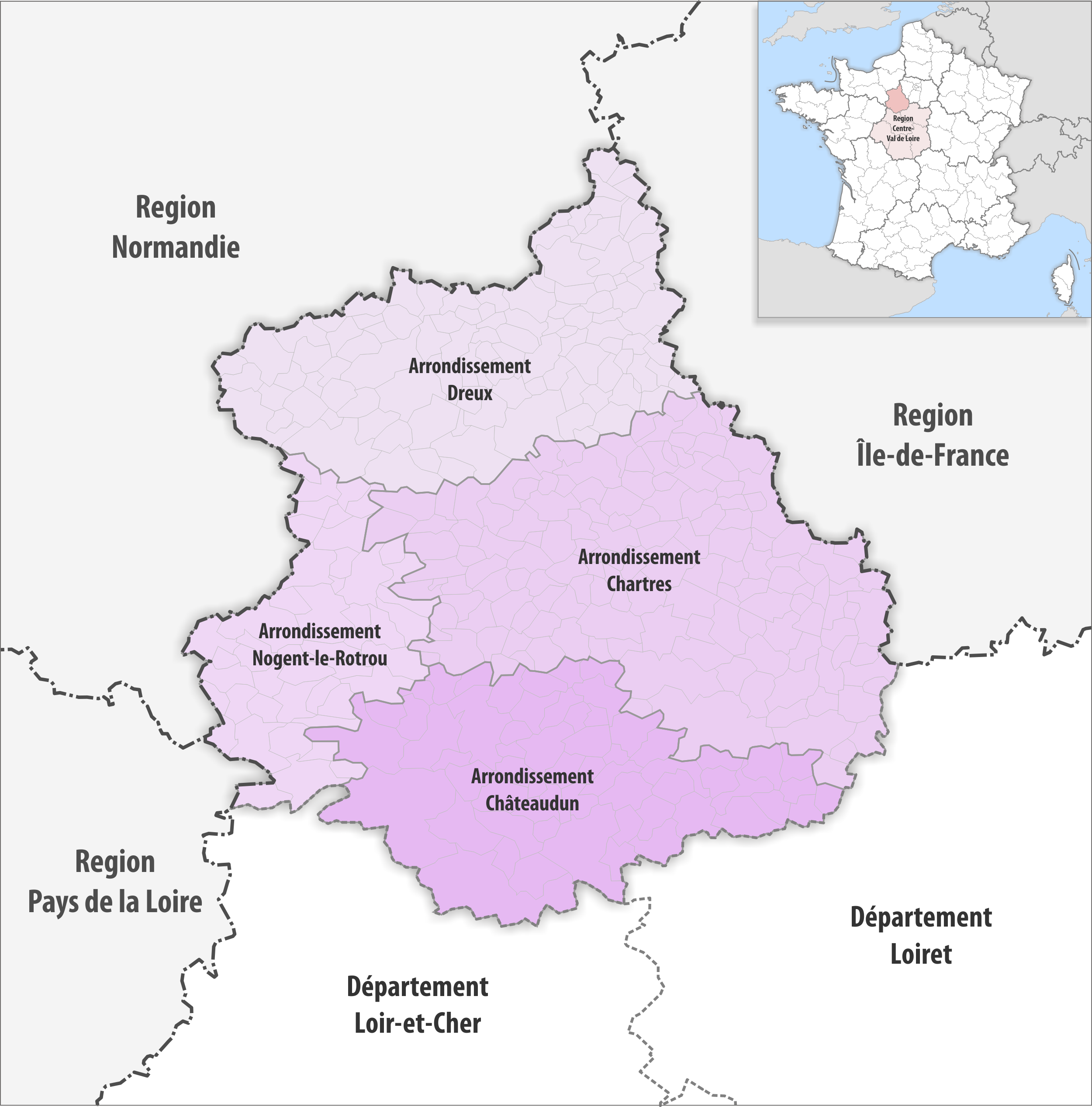 Gemeinden und Arrondissemente im Departement Eure-et-Loir